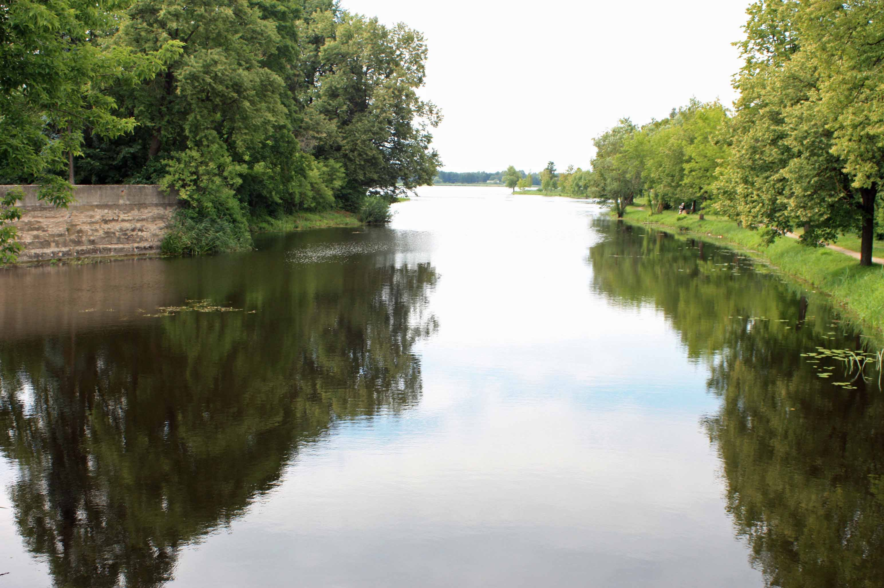 Agluonos upės žiotys Biržuose.